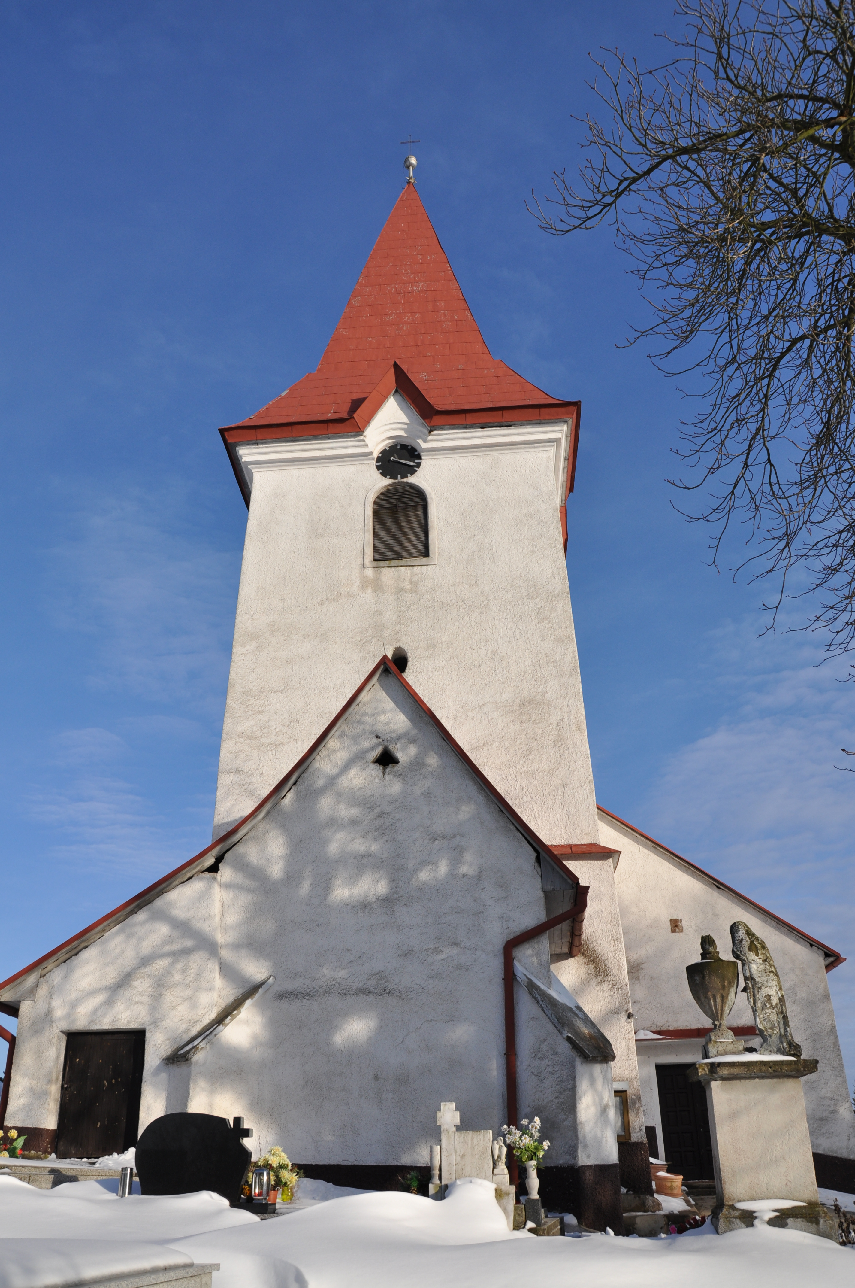 Kostol vo Valči